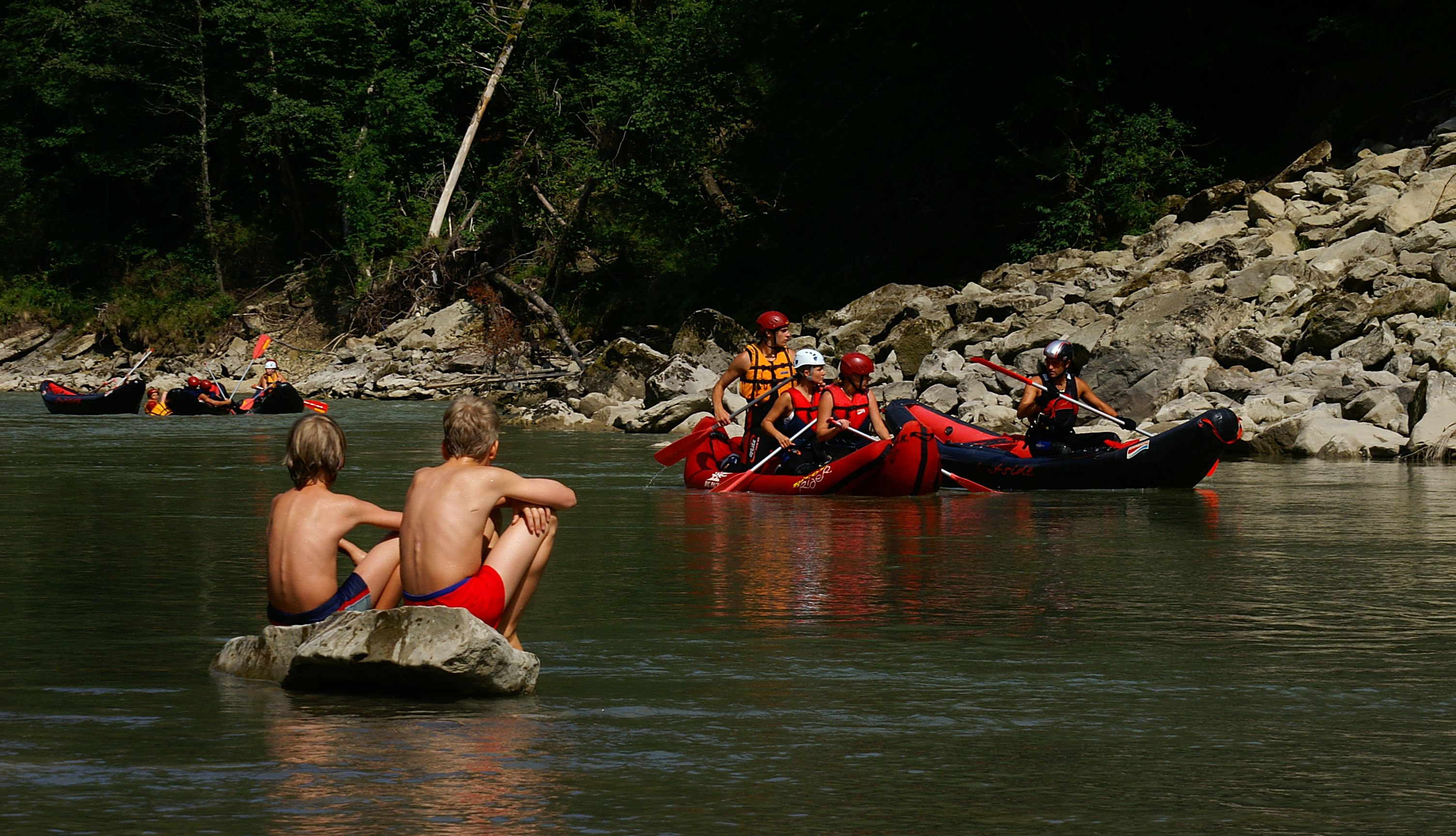 Rafting auf der unteren Bregenzerache - km69 - (Wolfurt, Kennelbach) Länge 9,5km, Schwierigkeitsgrad WW I-II